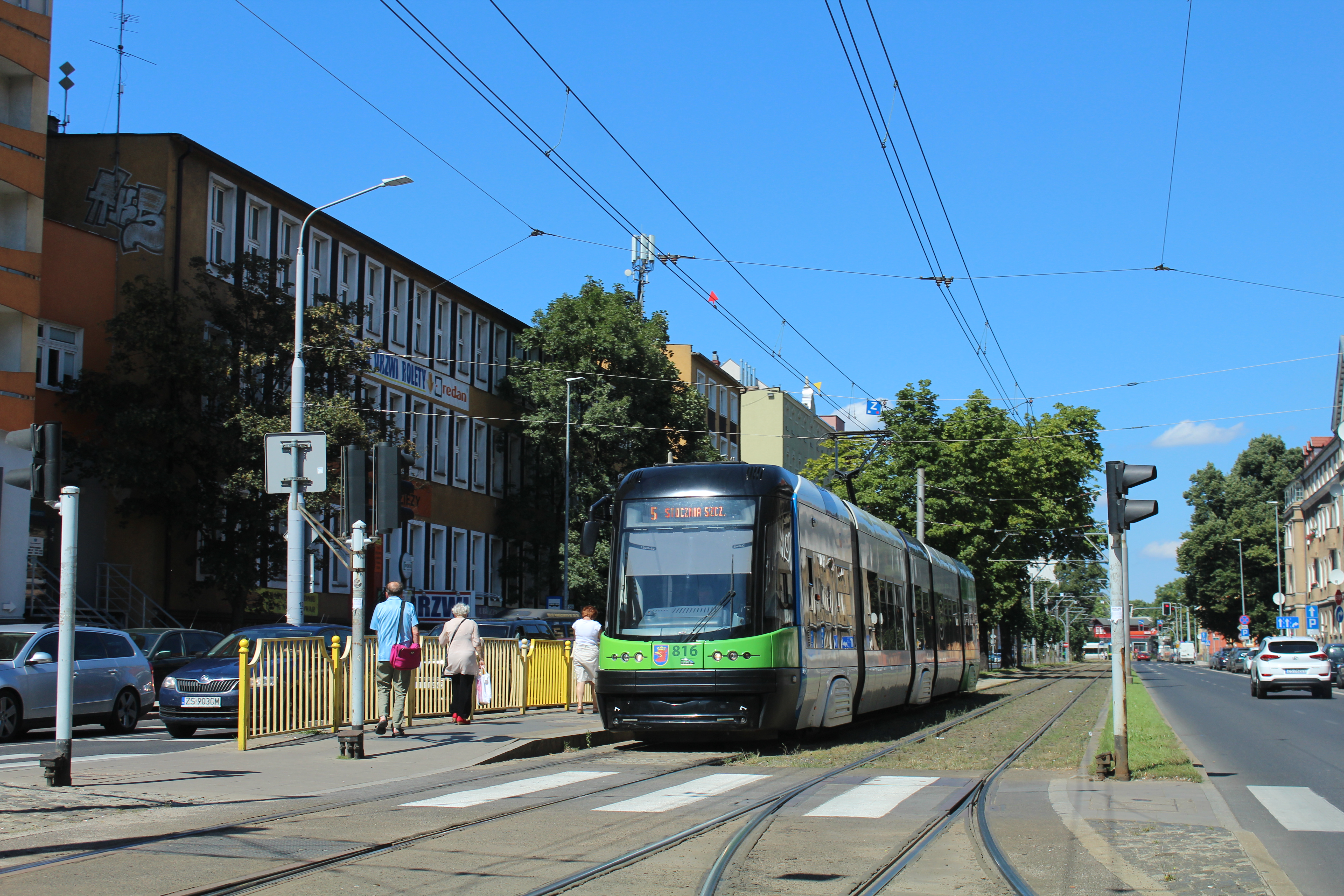 Pesa Swing w Szczecinie, 2017 r.